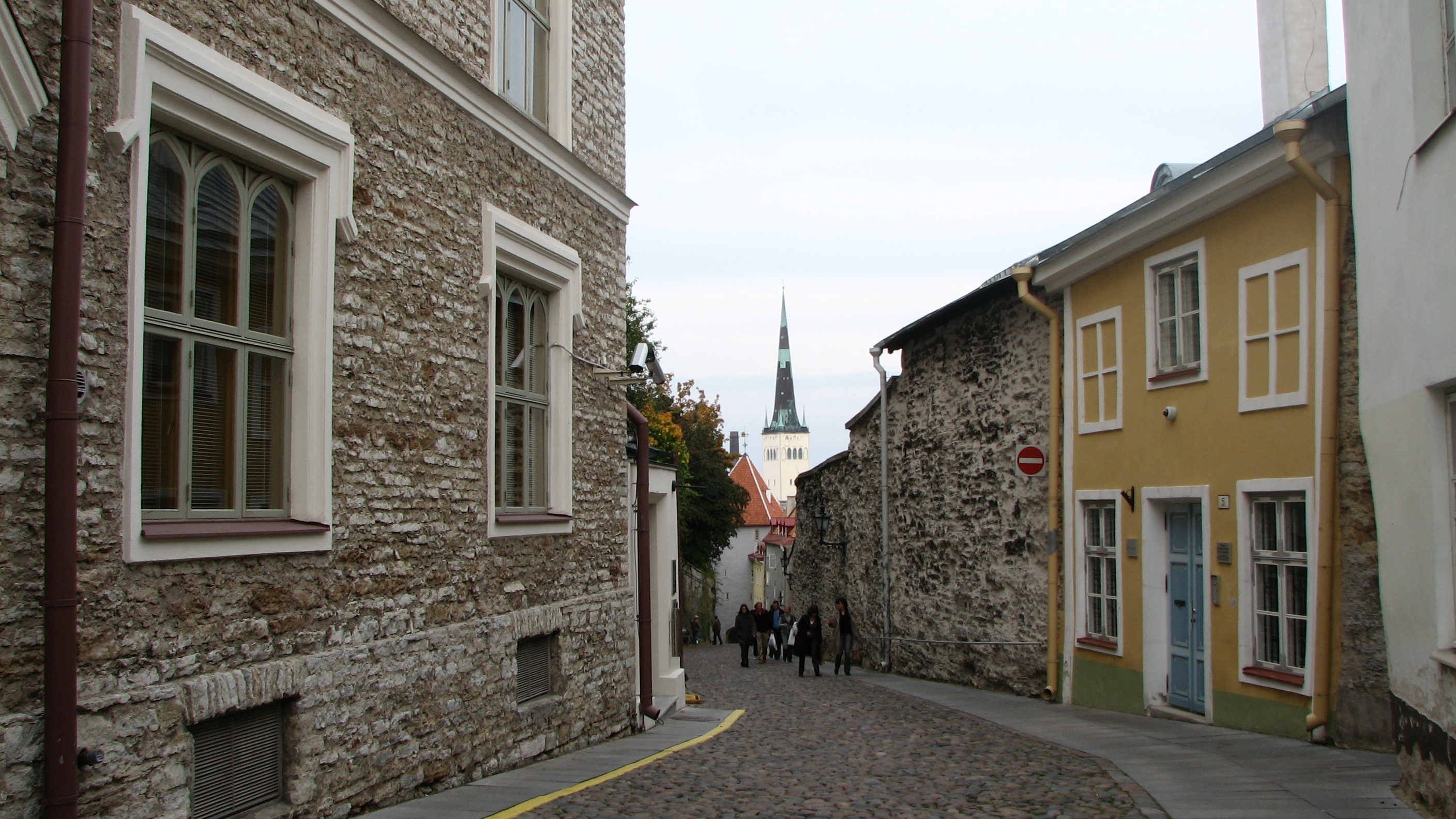 A Street in Tallinn called Pikk Jalg